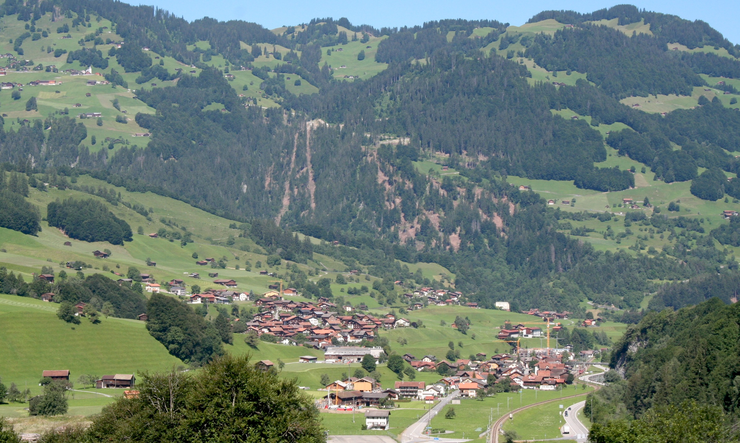 Jenaz im Prättigau